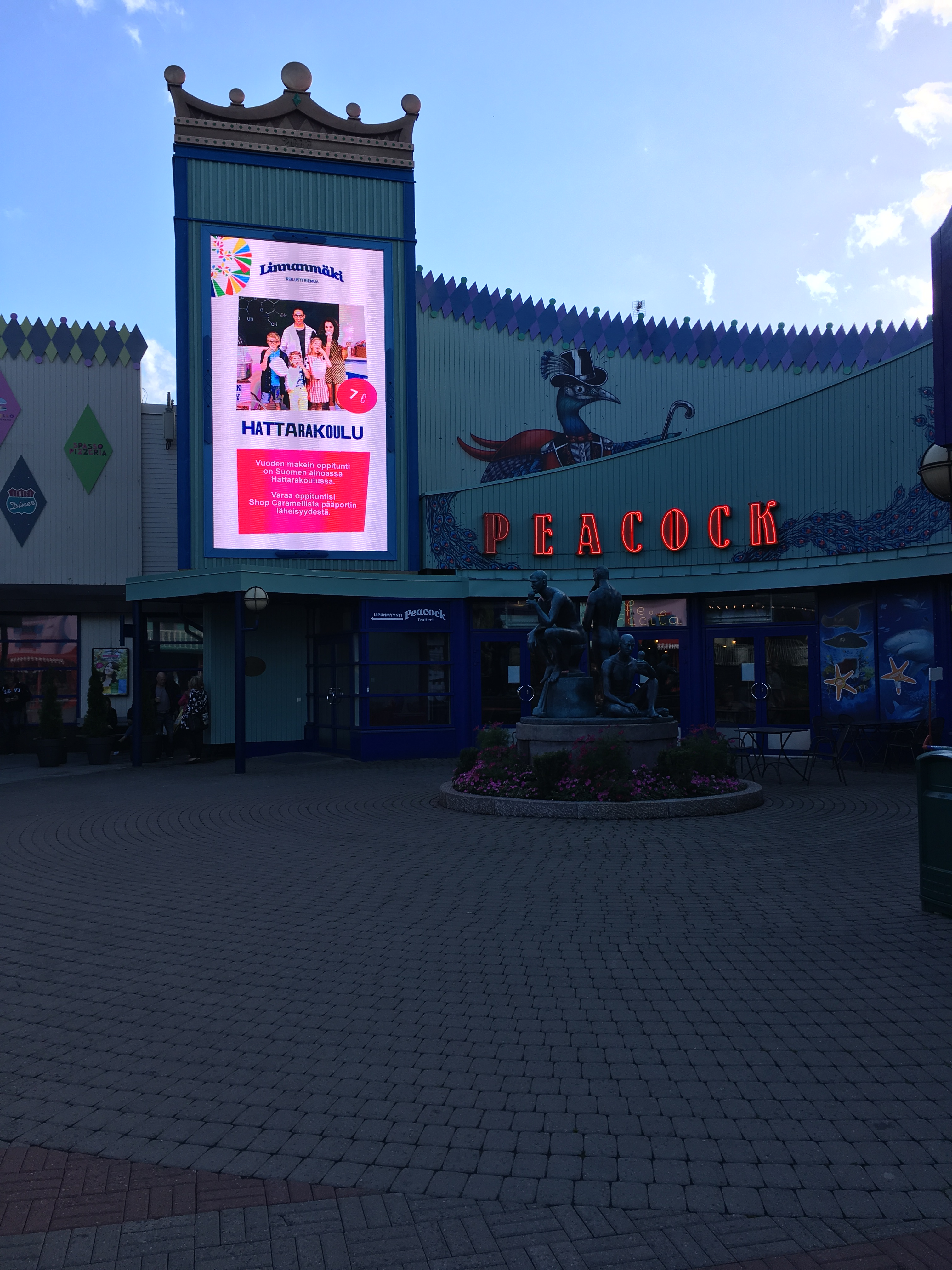 Peacock-teatteri Linnanmäellä, Helsingissä